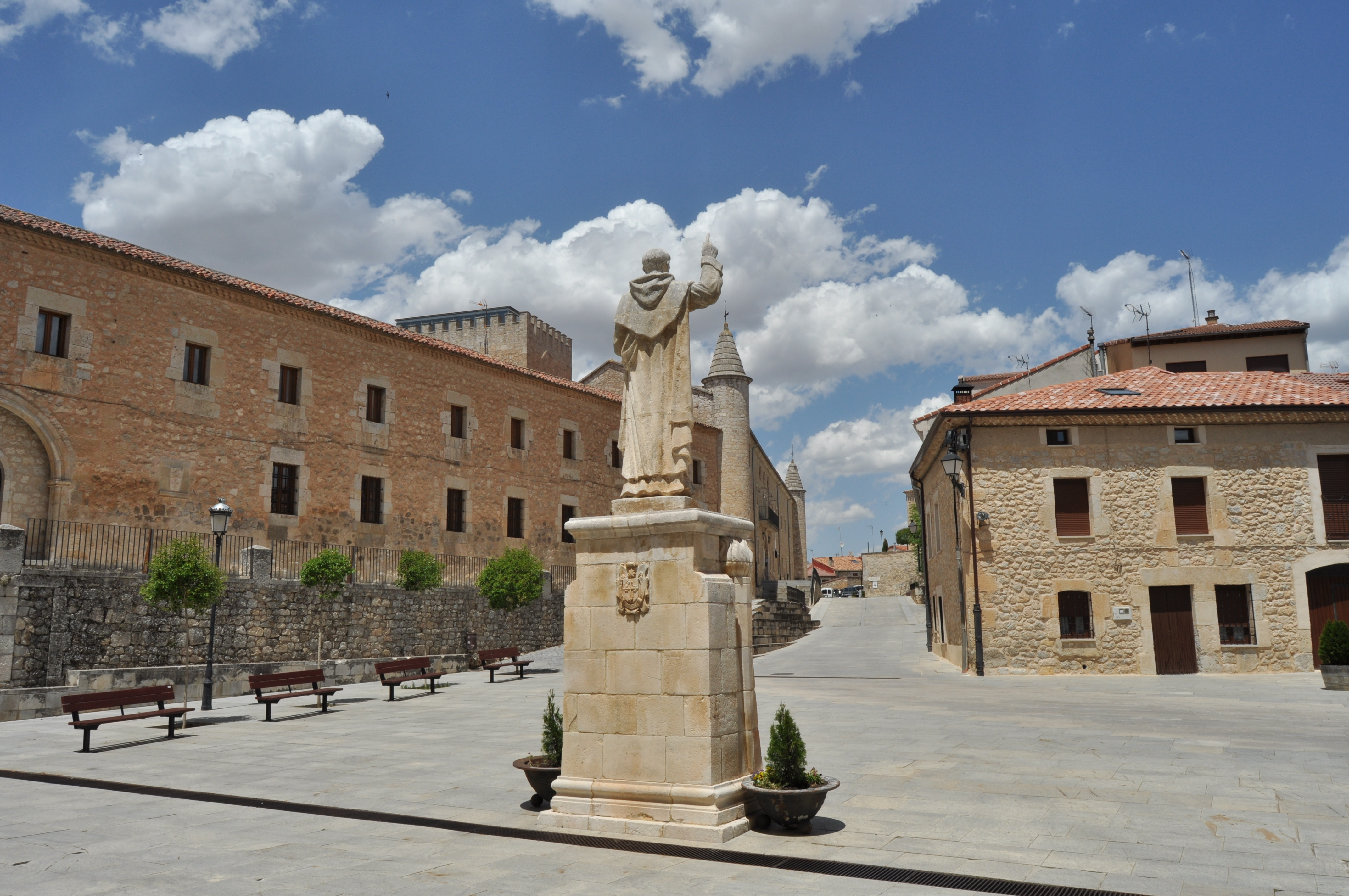 Caleruega - 005